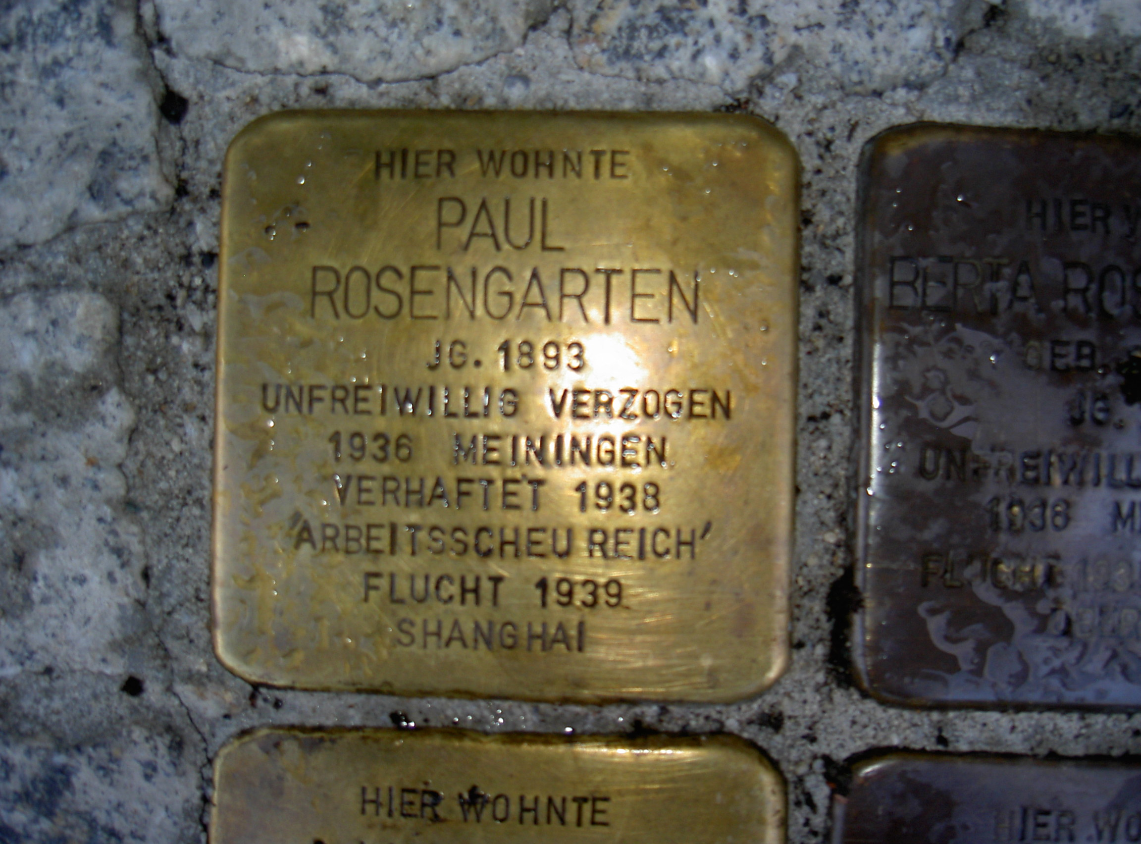 Stolperstein in Themar Rosengarten Paul